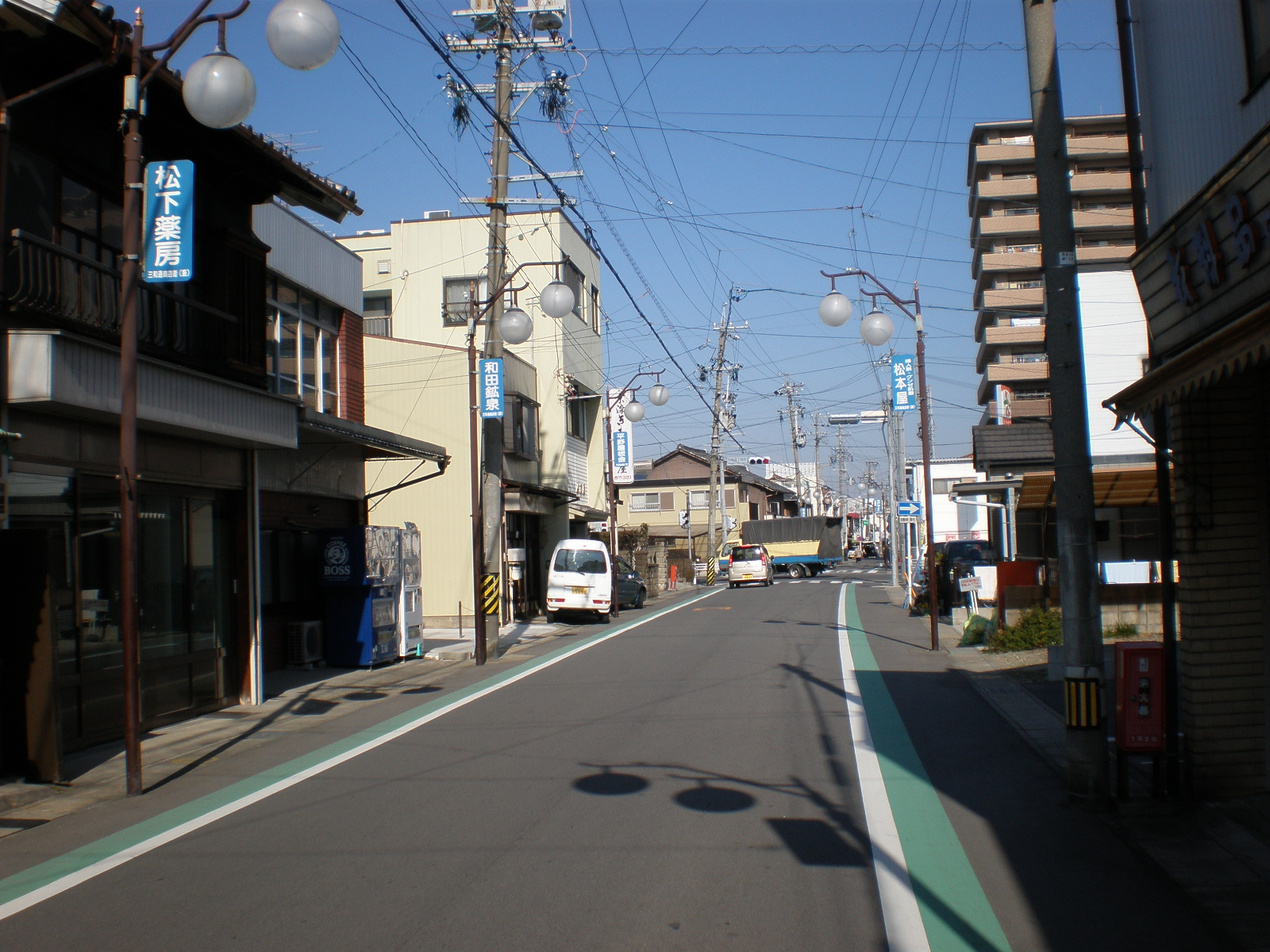 愛知県北部にあった旧街道（上街道、撮影場所：愛知県小牧市小牧4丁目（旧・小牧宿））